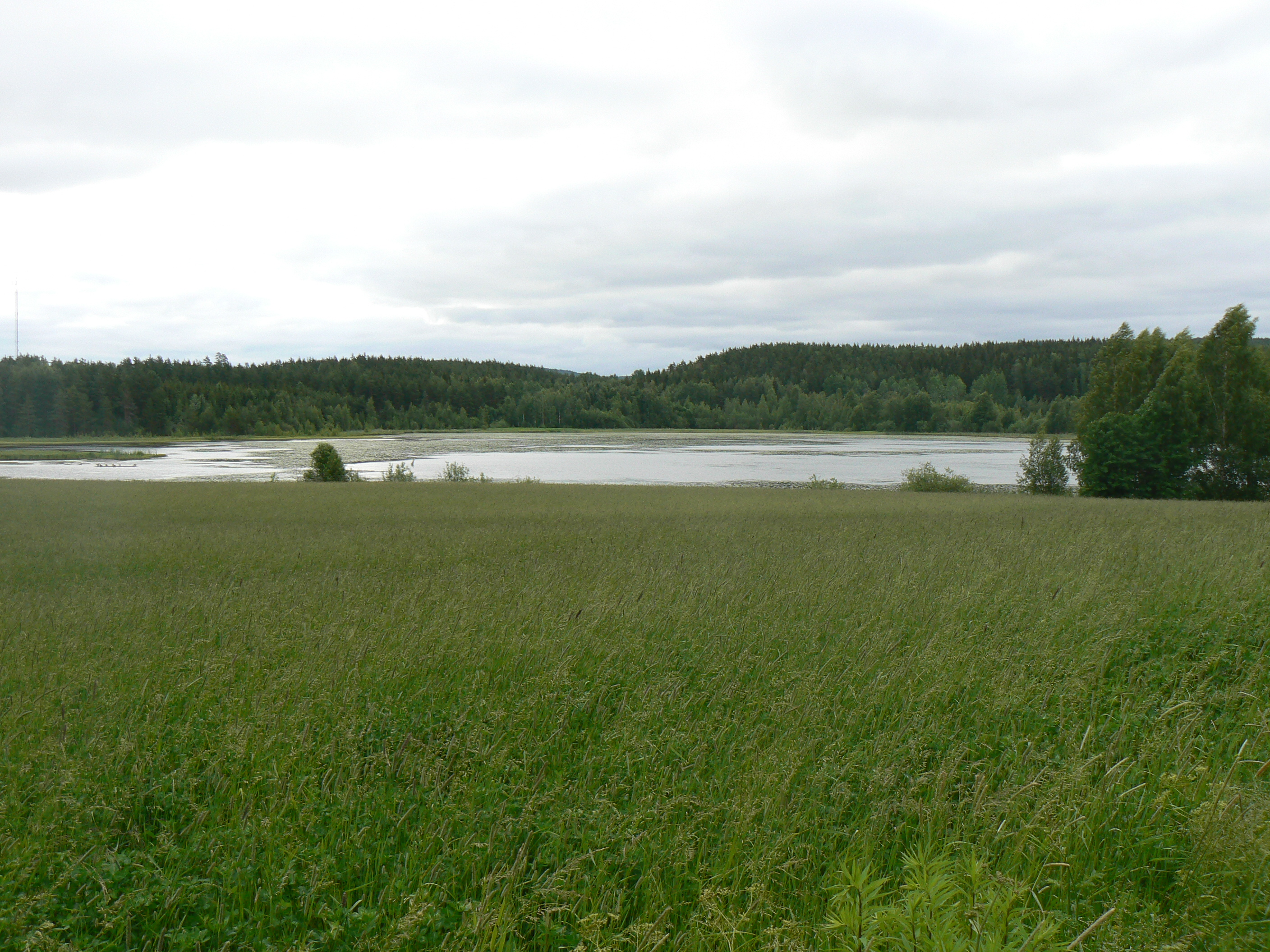 Karlslundstjärnen, little lake near Falun in Sweden.